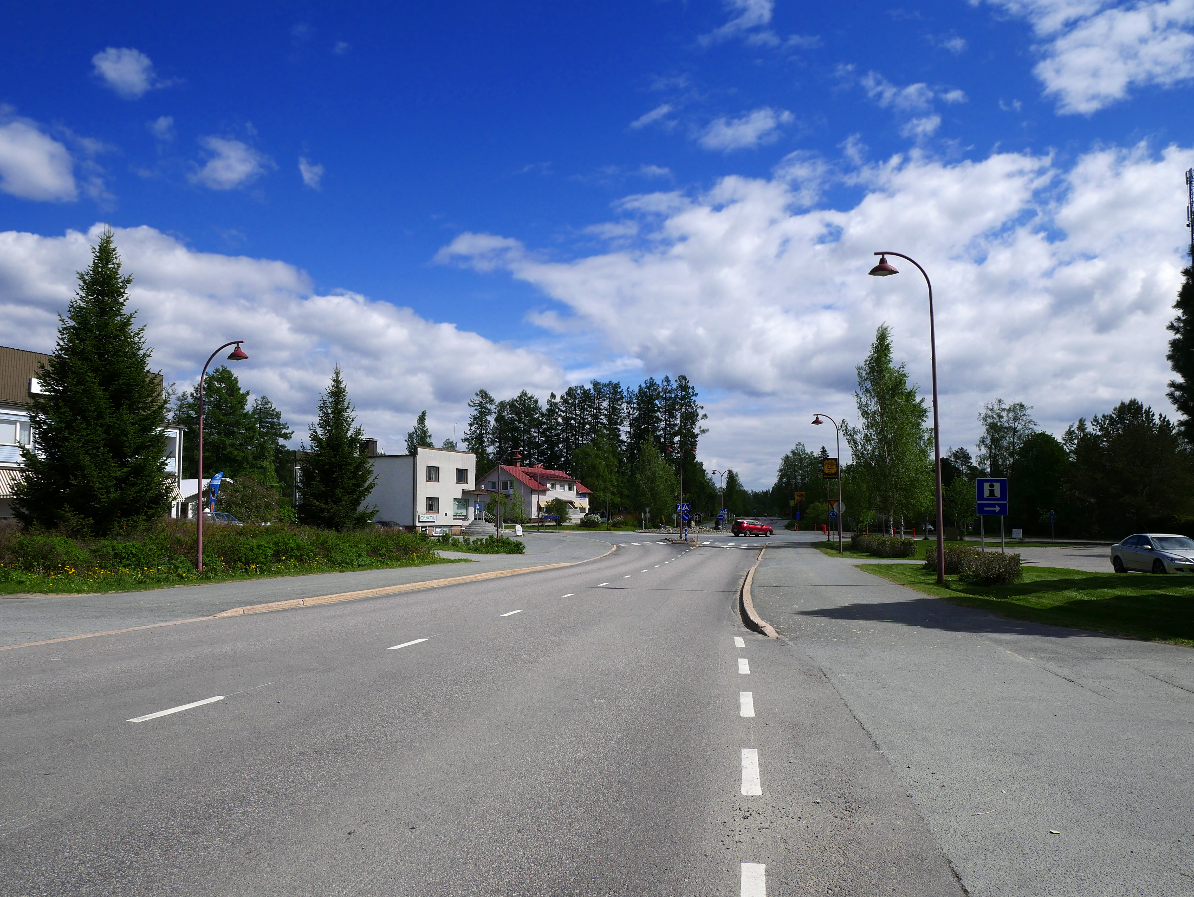 Soinin kunnan keskustaa.